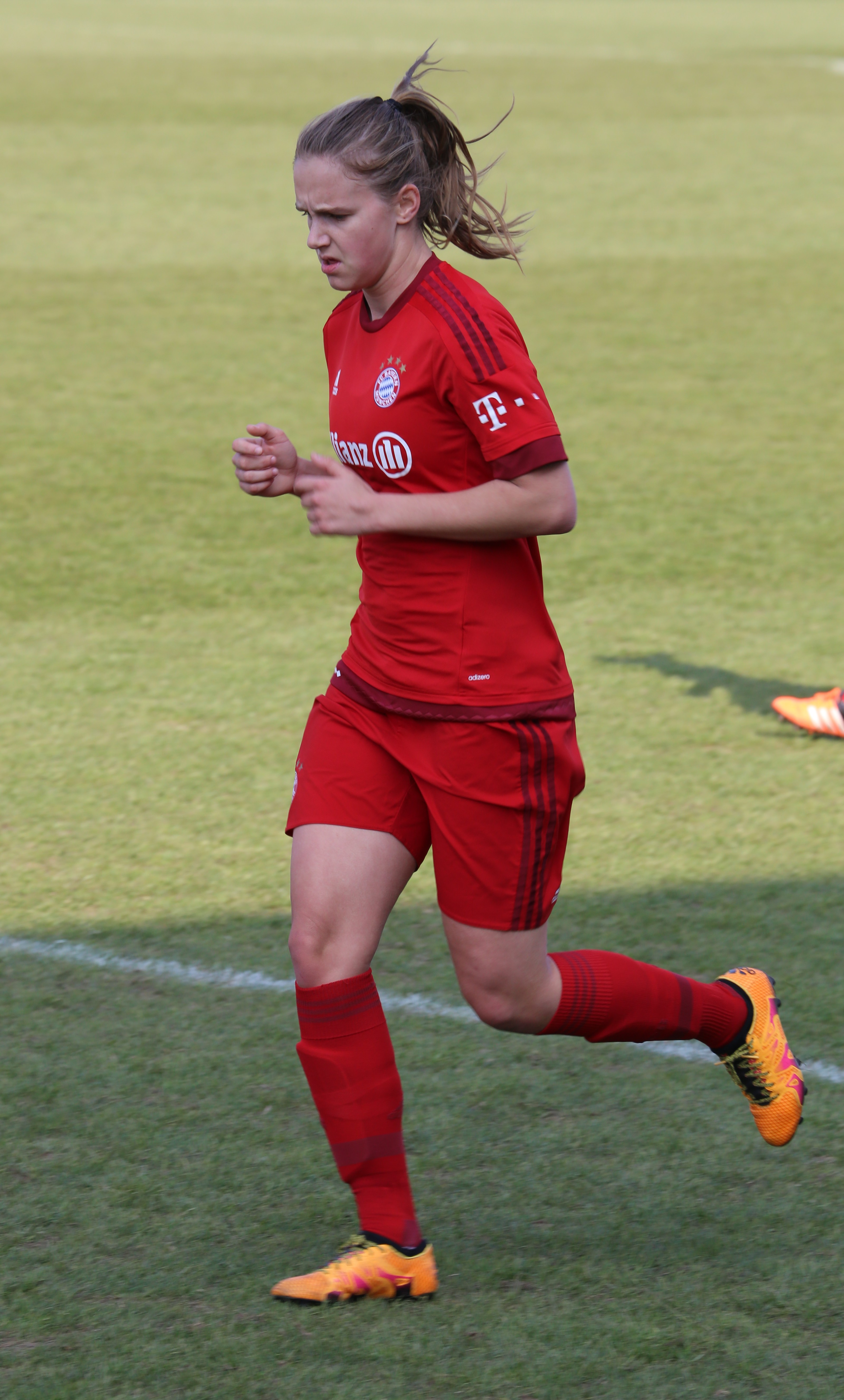 Vivianne Miedema (FC Bayern München) beim Frauen-Bundesliga-Spiel FC Bayern München gegen FF USV Jena am 19. März 2016 im Stadion an der Grünwalder Straße (Ergebnis war 5:1).